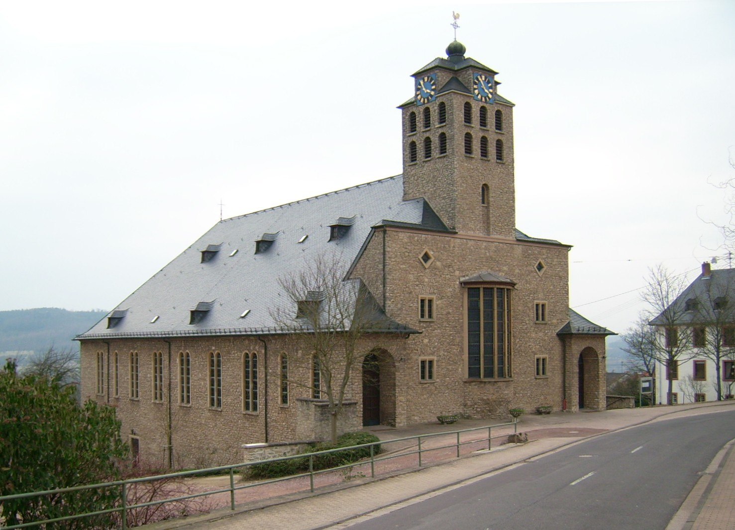 Sankt Martin in Bietzen